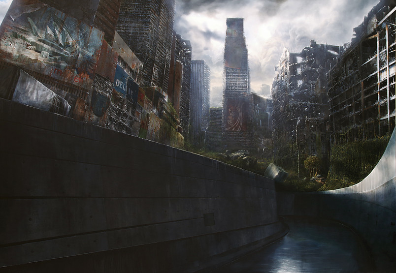 Cultural Landscape, Naoya Inose, 2013, From the series "Wreck of the Hope" materials: acrylic, alkyd, oil on canvas 181.8 x 259 cm